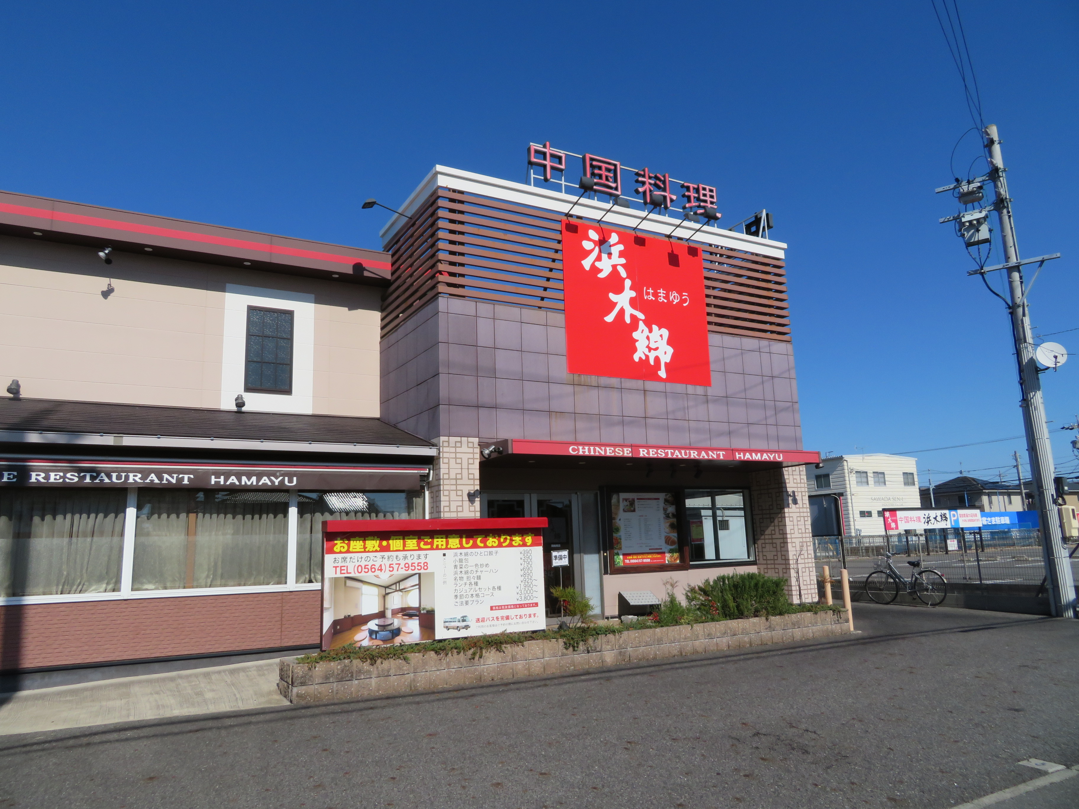 中国料理浜木綿、岡崎南店（岡崎市法性寺町）